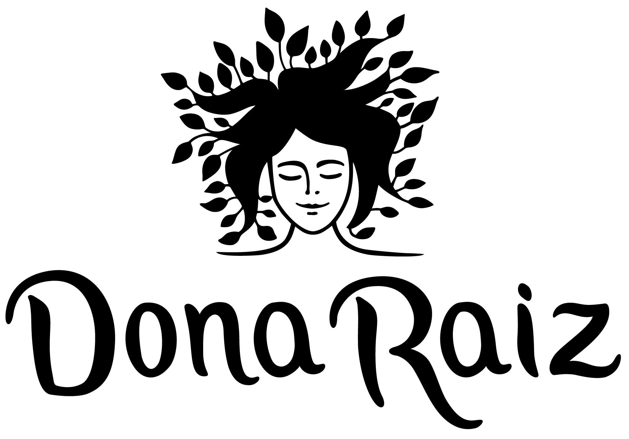 Dona Raiz